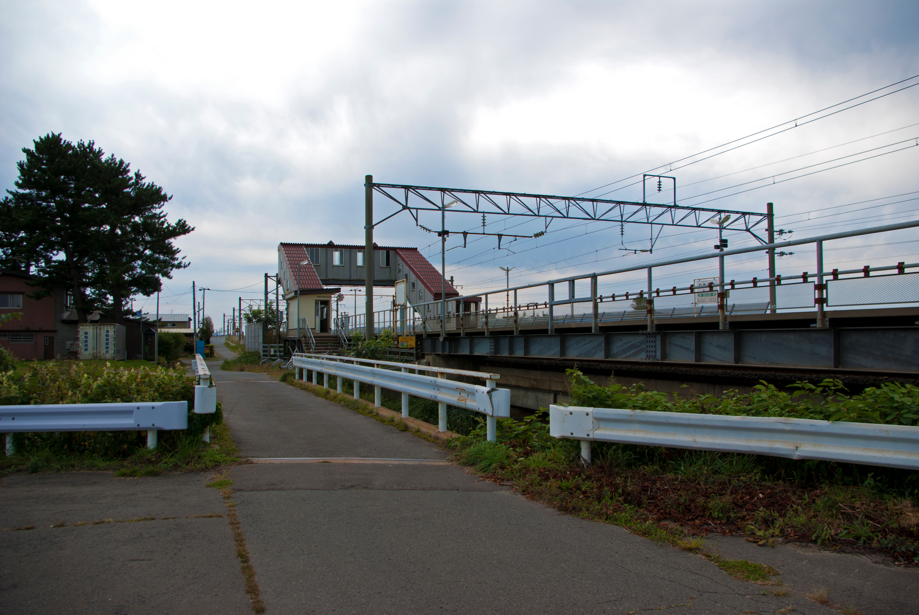 東日本旅客鉄道津軽線中沢駅